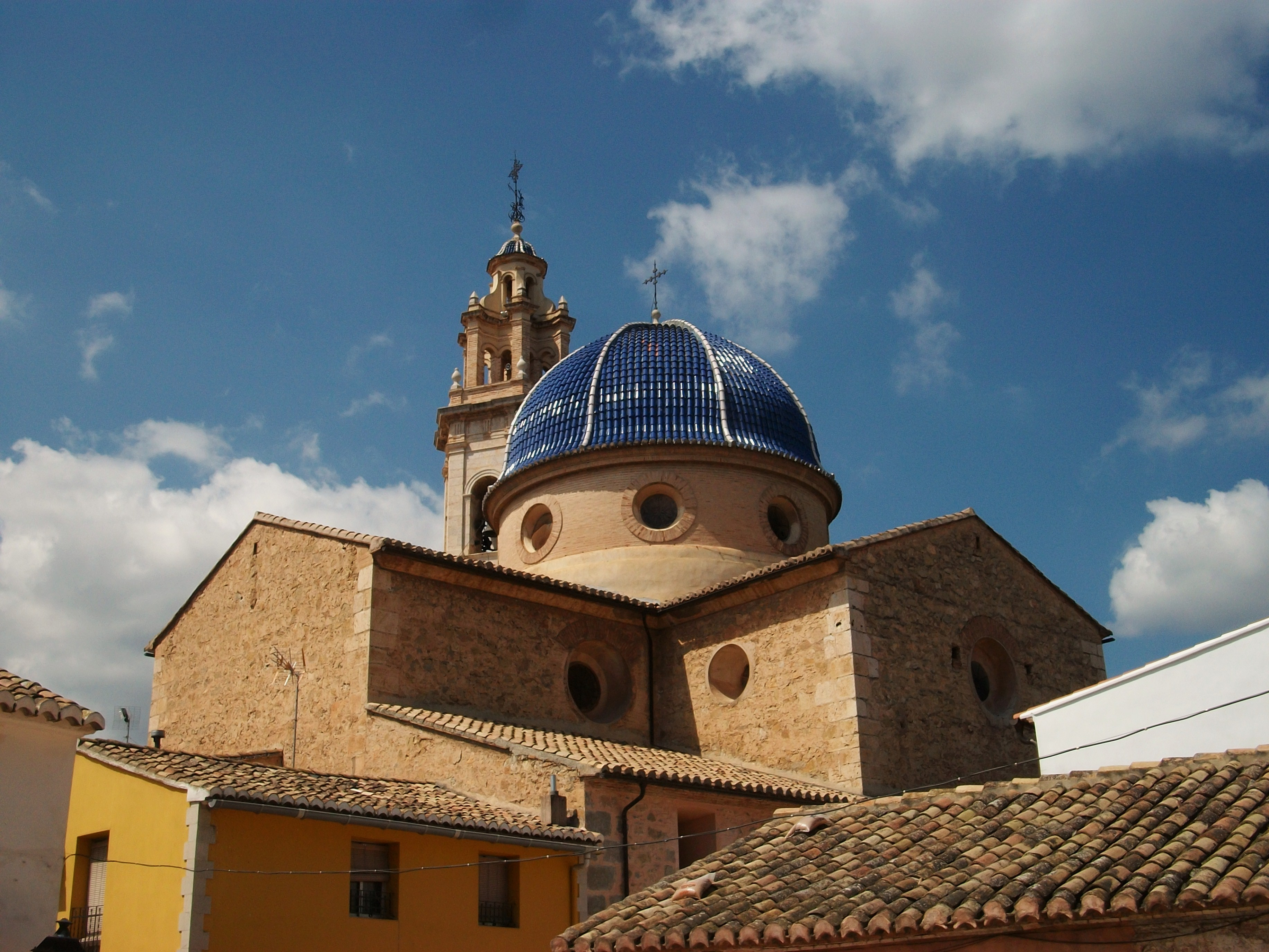 Església de Sant Miquel Arcàngel d'Altura (l'Alt Palància, País Valencià).